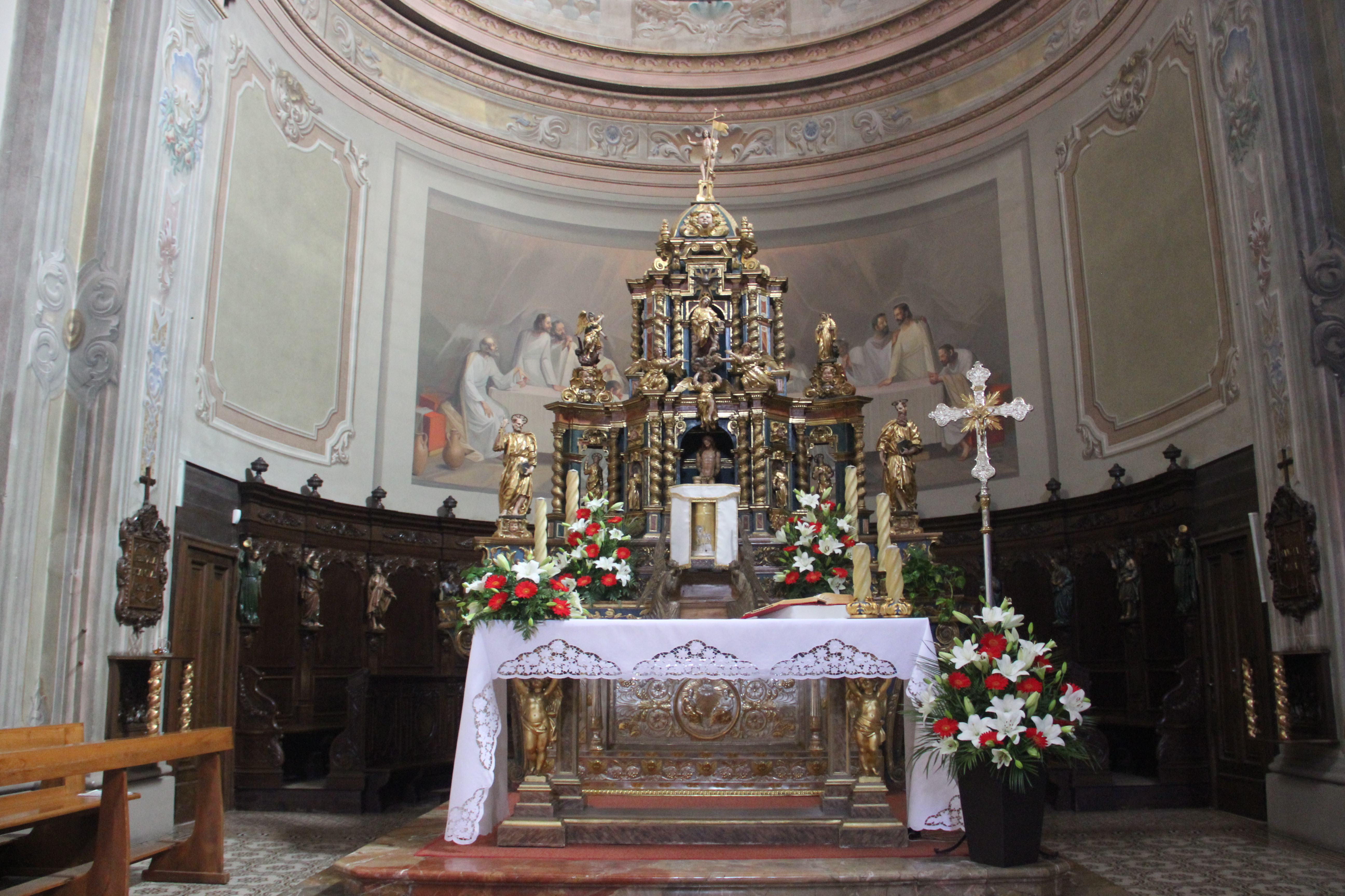 altare maggiore e coro della chiesa arcipretale plebana dei Ss. Pietro e Paolo di Uggiate